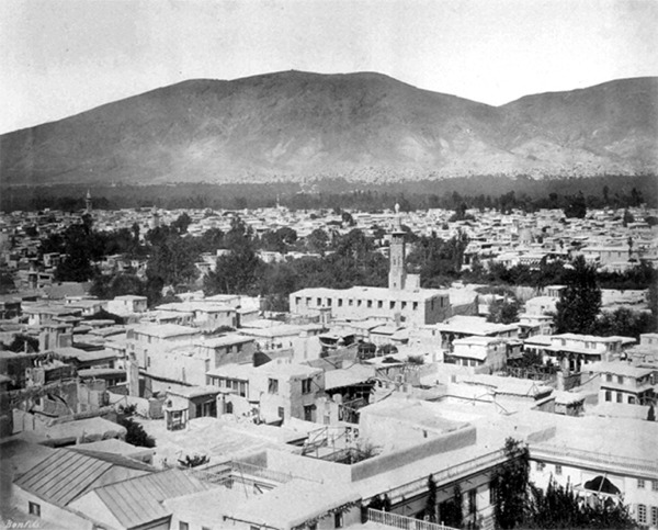 منظر عام لمدينة دمشق تانسريد دوماس 1870